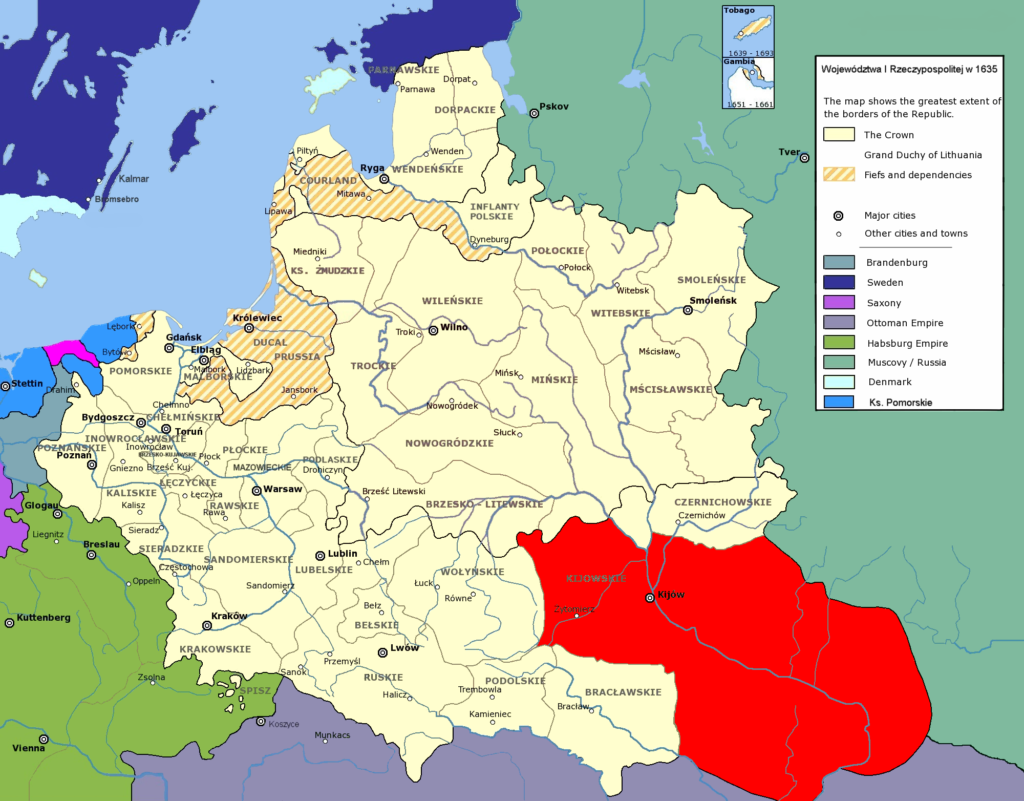 Rzeczpospolita Obojga Narodów w 1635 r.; województwo kijowskie Polish-Lithuanian Commonwealth in 1635; Kijów Voivodeship